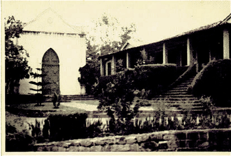 Fazenda riachão local de nascimento de José Oitica.